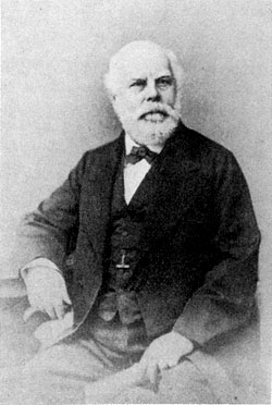 Dr. Georg Engelmann im Jahr 1880